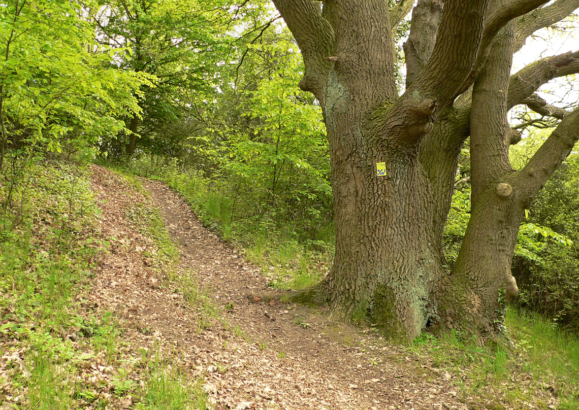 Landschaftsschutzgebiet und Geotop Dütberg, Weserberglandweg